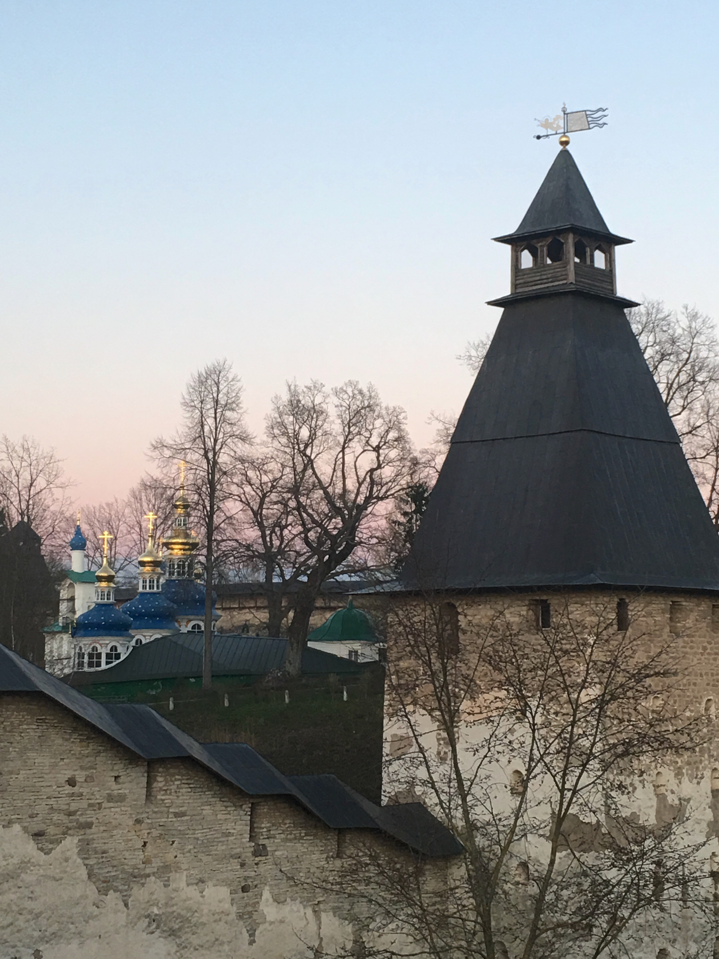 Свято-Успенский Псково-Печерский мужской монастырь